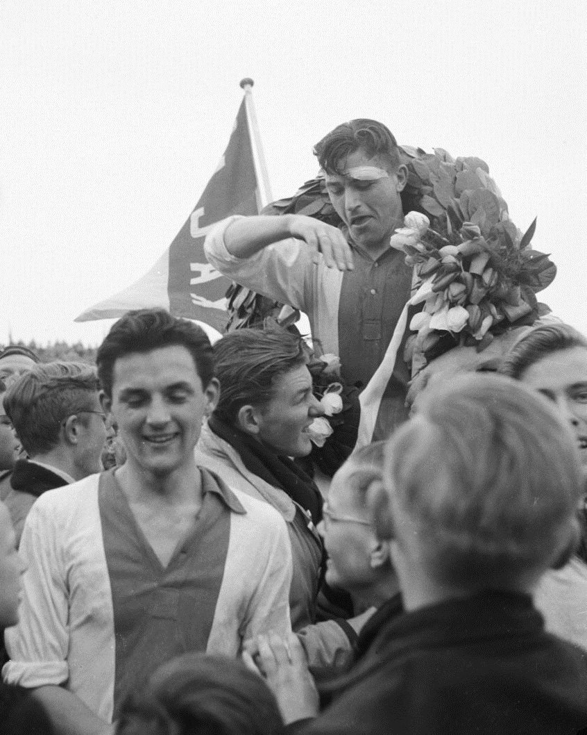 Theo de Groot en Jan Potharst